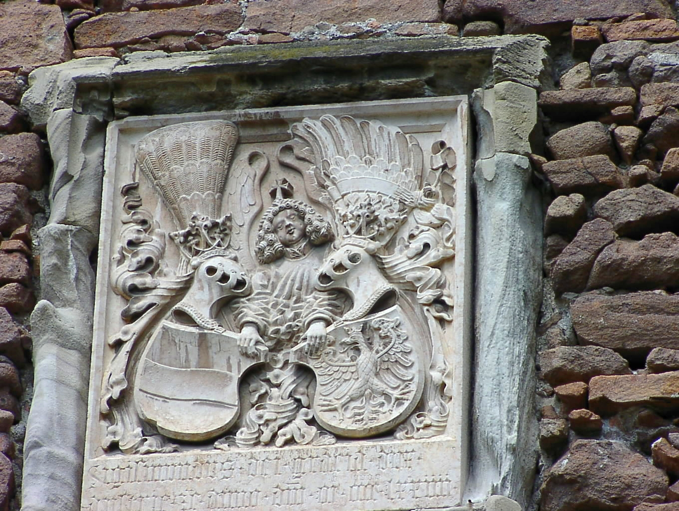 Sigmundskron